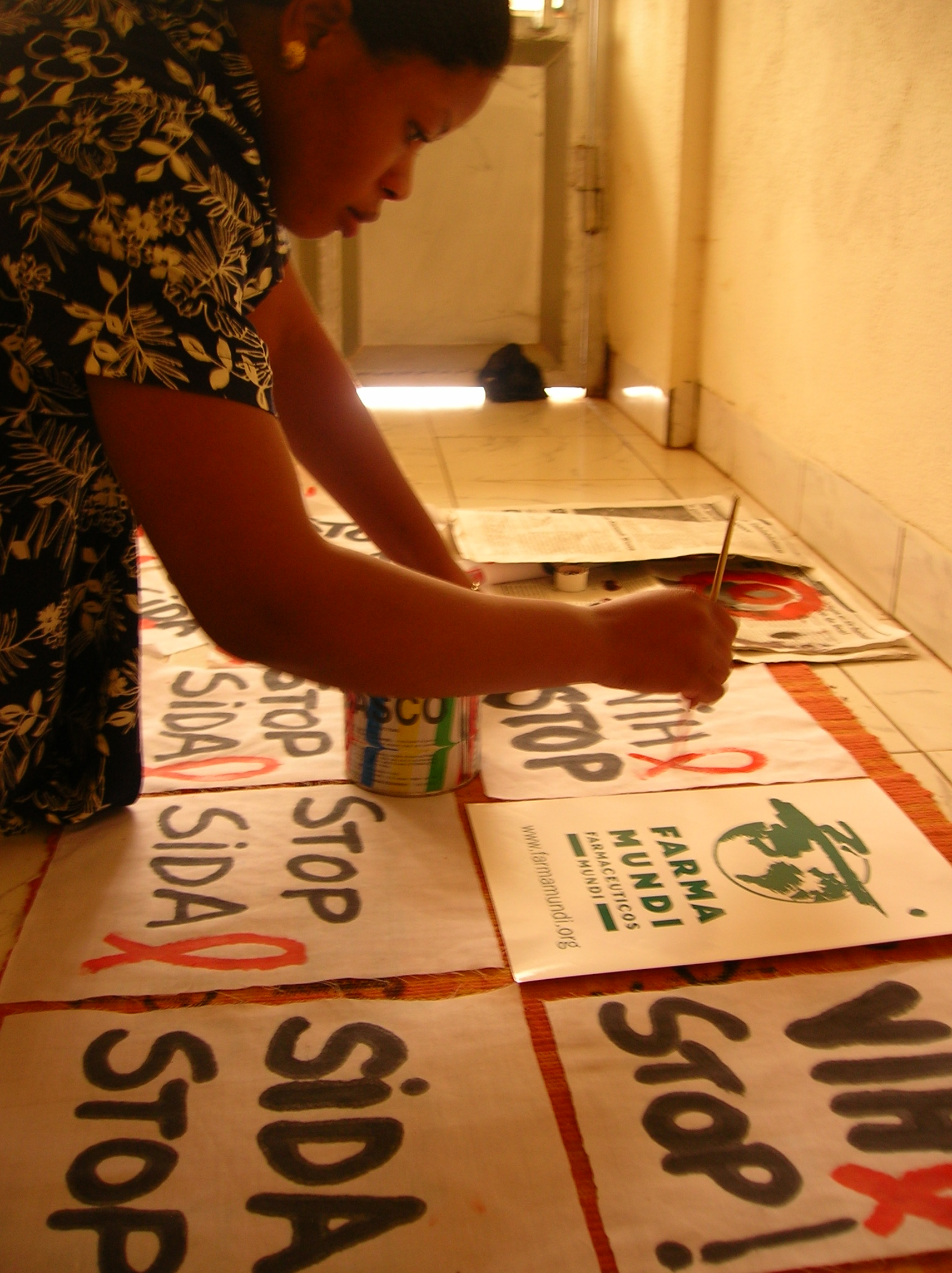 Manifestación lucha contra el SIDA. Butembo. RDC